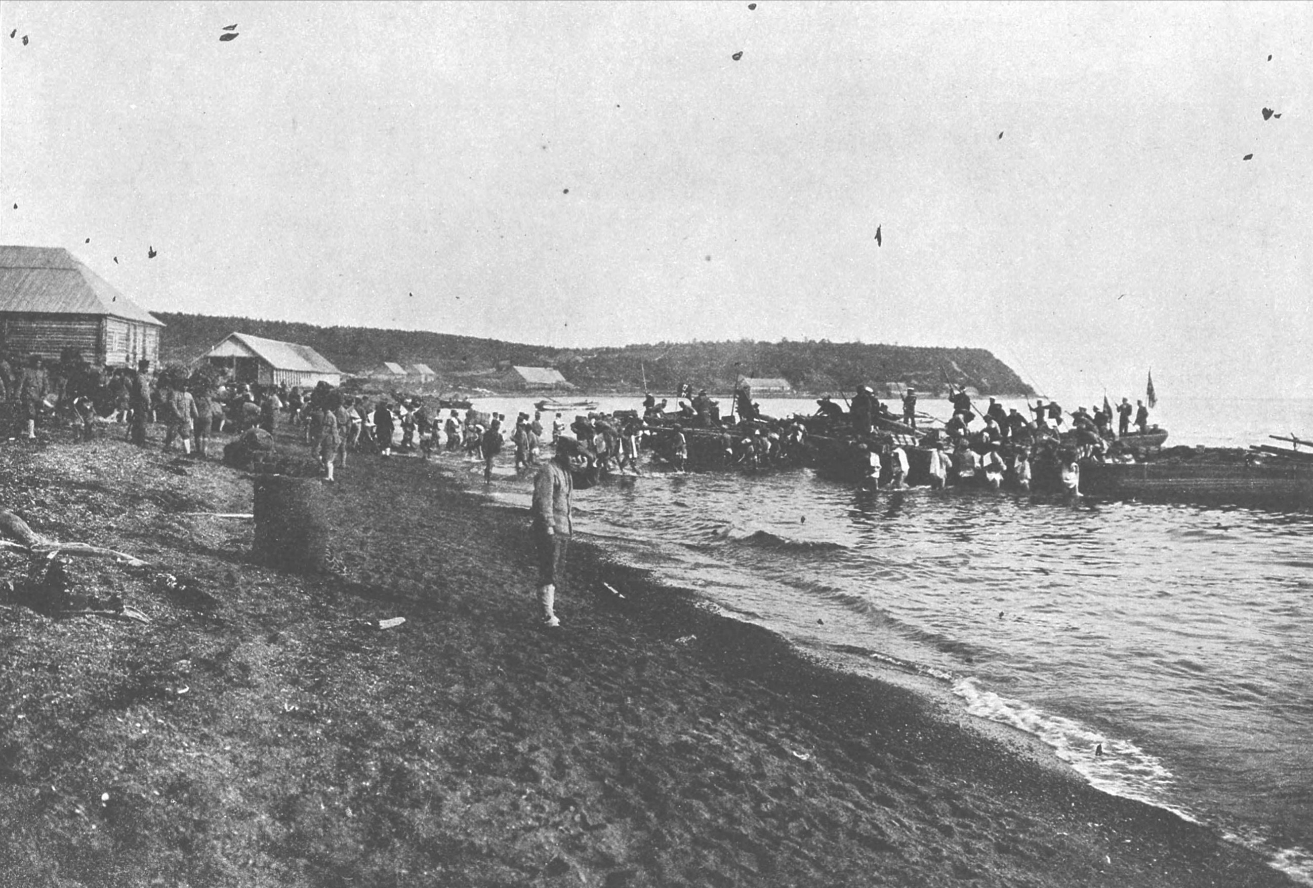 ポロアントマリ（日本統治時代の大泊町、現ロシア連邦サハリン州コルサコフ）に上陸する日本軍